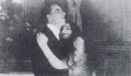 Scène extraite du film "La tragedia del silencio"